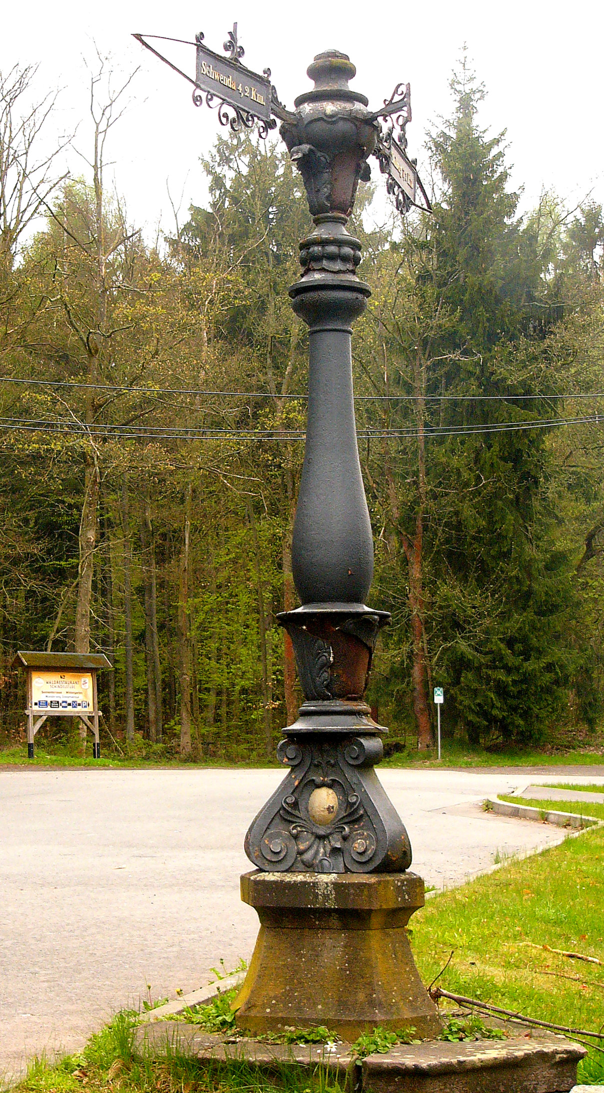 Wegweiser am Parkplatz für die Josephshöhe This is a photograph of an architectural monument. 83935